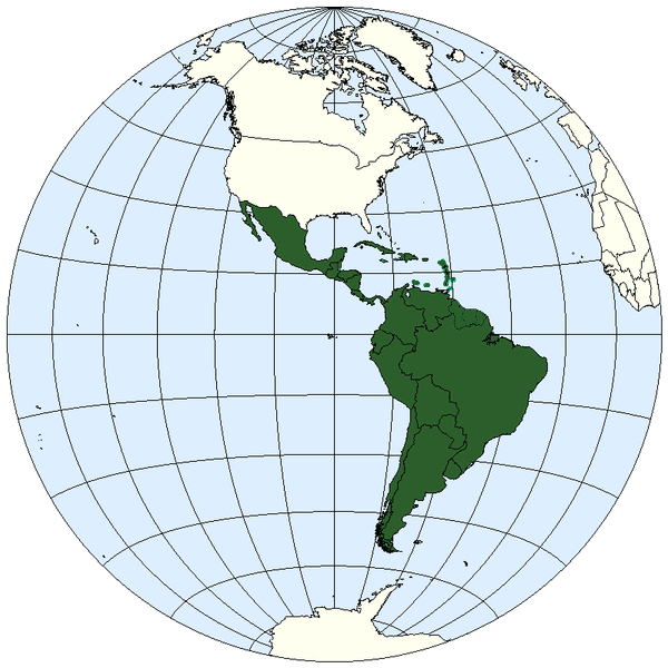 mapa America Latina, acepción geopolítica